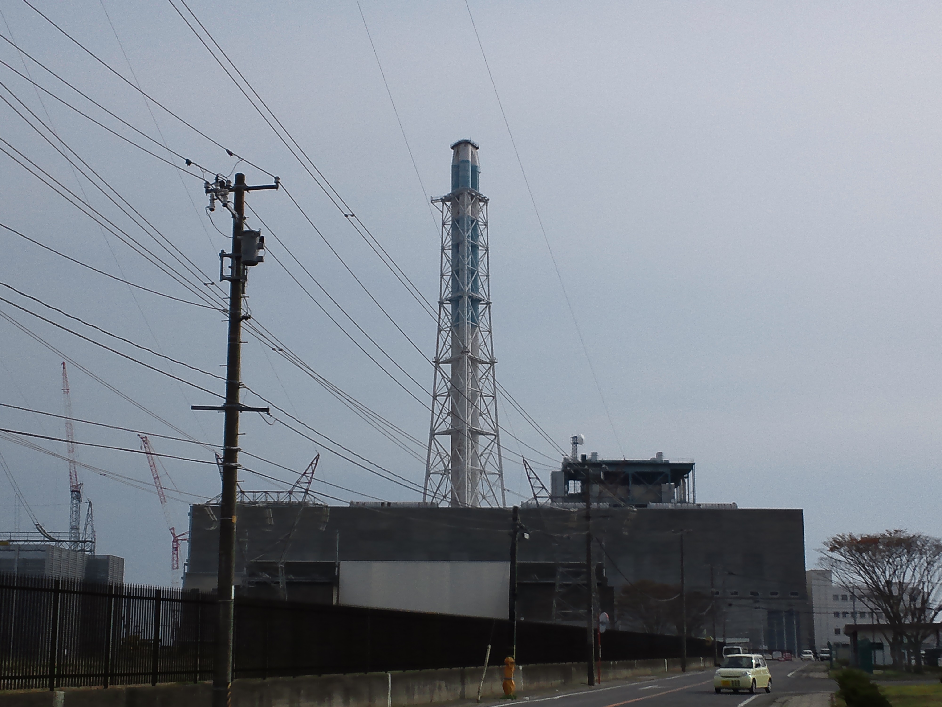 東北電力新仙台火力発電所 1、2号機